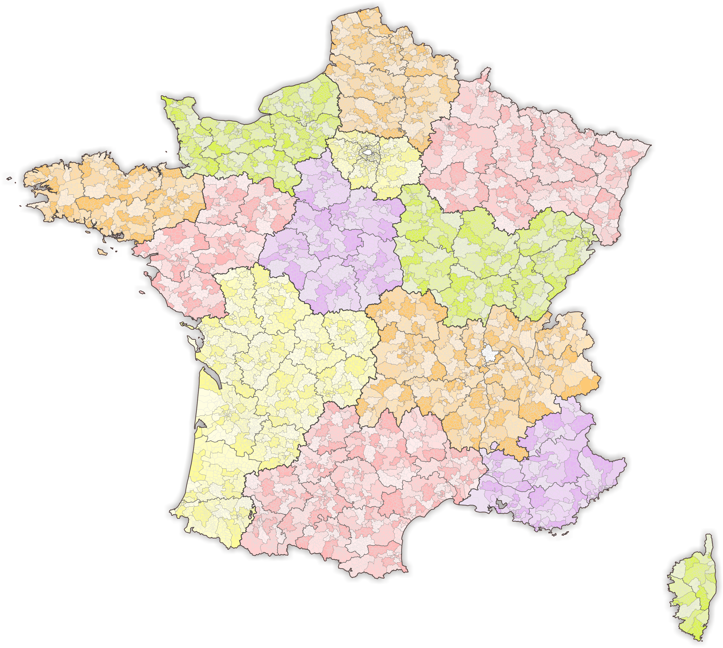 Kantone von Frankreich, Stand 2018